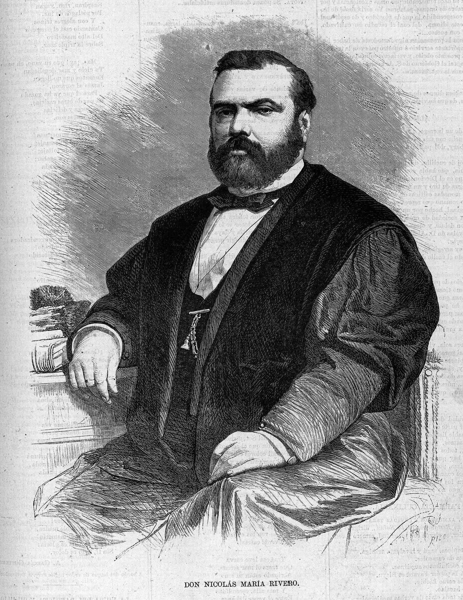 Nicolás María Rivero, en la revista La Ilustración de Madrid.